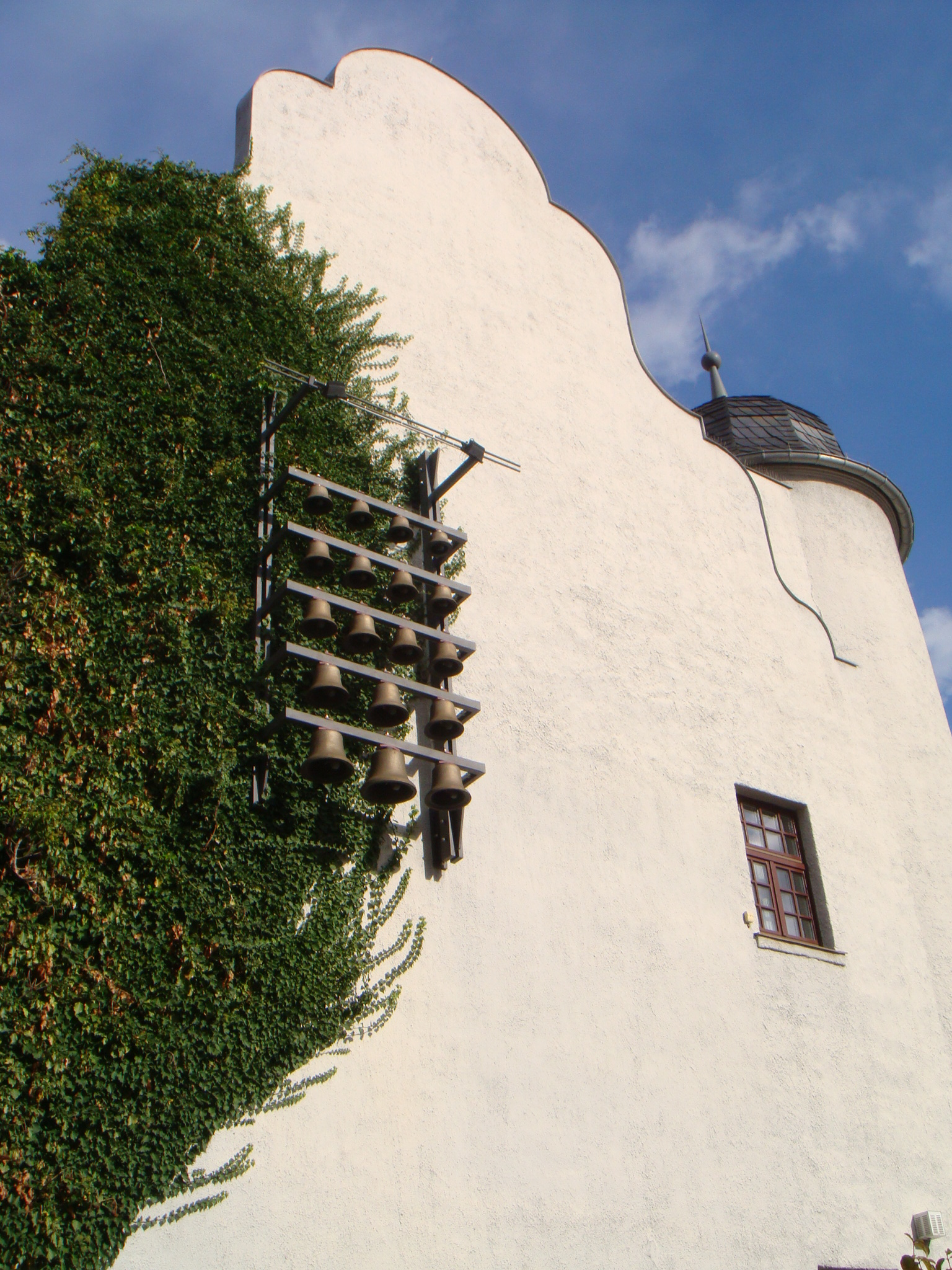 Glockenspiel am Stadthaus